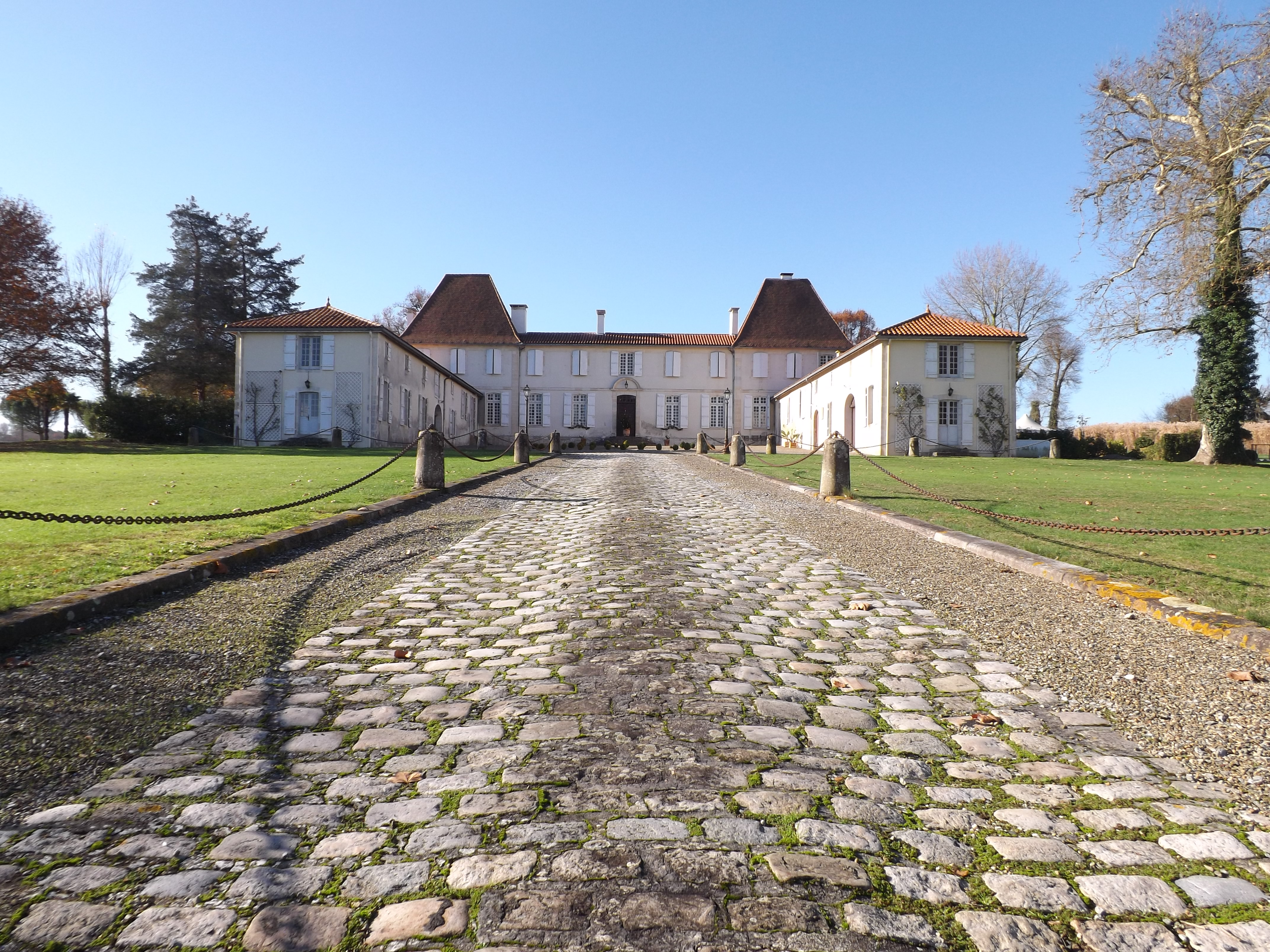 Castèth de Caupena, Shalòssa, Gasconha